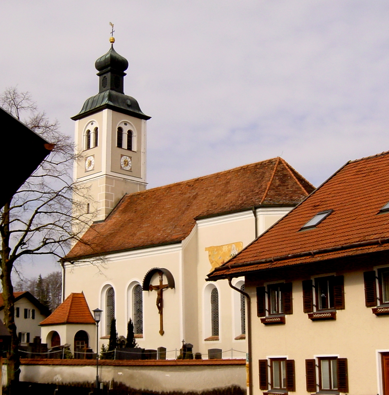 Starnberg-Perchting, Kirche Mariä Heimsuchung. Die erste urkundliche Erwähnung einer Kirche in Perchting stammt aus dem Jahre 1357. 1764 wurde das Gebäude nach einem Brand neu errichtet. Bereits vier Jahre später vernichtete eine erneute Feuersbrunst das Gotteshaus – und mit ihm 1/3 aller Perchtinger Anwesen. Ein Neubau – im Stil des Rokoko von Balthasar Trischberger ausgeführt – konnte 1776 vollendet werden. Seit einer Hauptrenovierung im Jahre 1960 zeigt sich die Perchtinger Kirche wieder in ihrer alten Schönheit.[1]This is a photograph of an architectural monument.